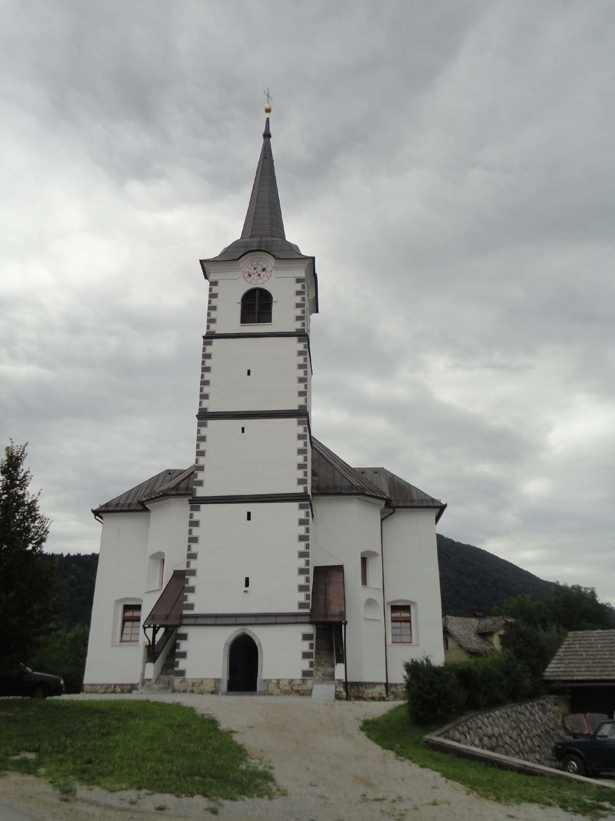 Cerkev v Črmošnjicah